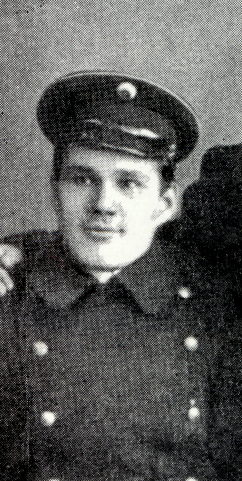 Aleksander Hint